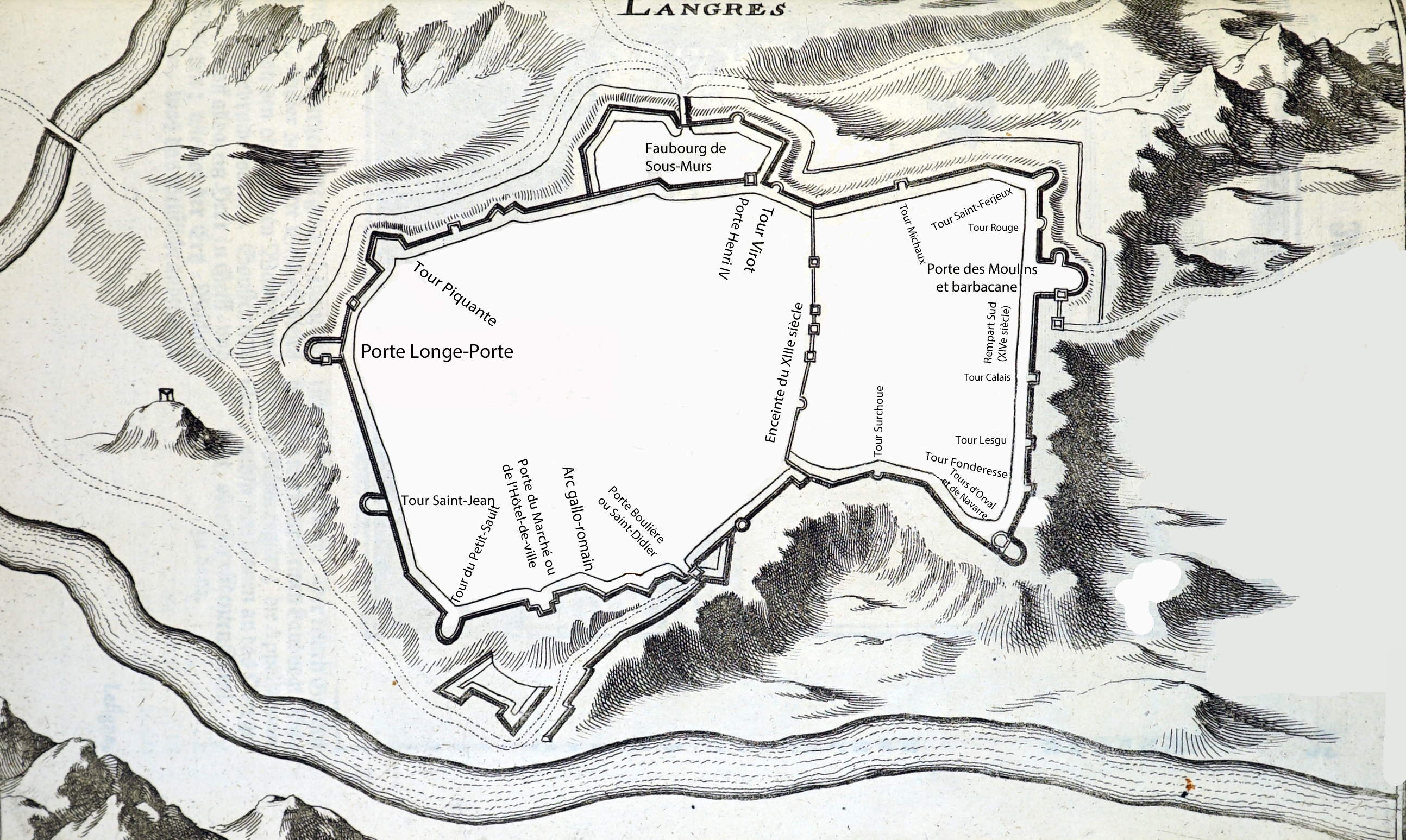 Plan des remparts de Langres de 1650 annoté des noms des tours et des portes